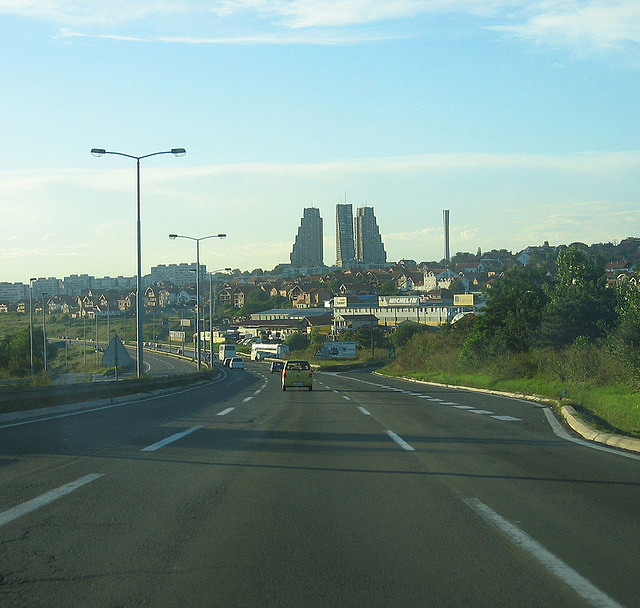 Beograd. [Foto: Lazarro]